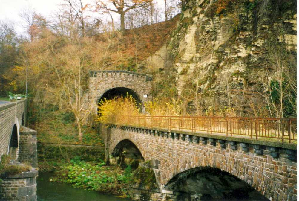 Stillgelegter Abschnitt der Bahnstrecke Dümpelfeld–Lissendorf ("Mittlere Ahrtalbahn") bei Schuld (Ahr)